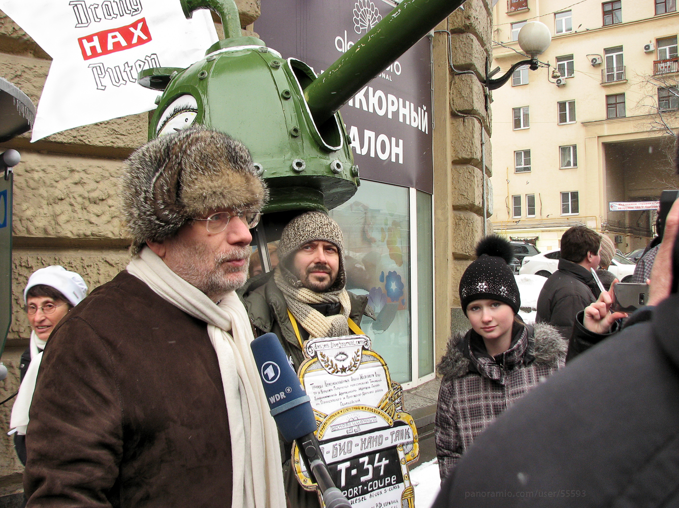 Писатель Борис Акунин (Григорий Чхартишвили) беседует с журналистами перед началом акции «Большой белый круг», прошедшей под лозунгом «За честные выборы». На писателе надет белый шарф (белые ленты, белые шарфы, белые шарики и т. п. — символы движения «За честные выборы», имеющего также антипутинскую направленность). Москва, Садовое кольцо, улица Земляной Вал, у дома 42, 26 февраля 2012 года, 13 часов 59 минут.